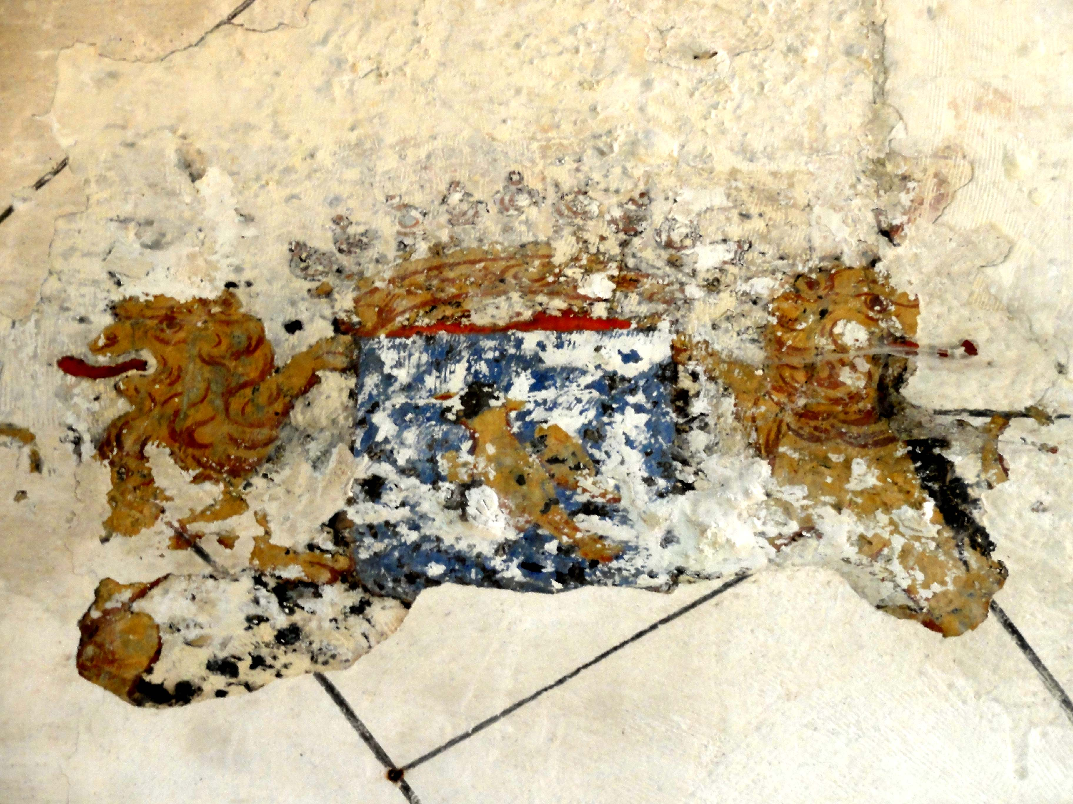 Nef, litre seigneuriale au revers de la façade.